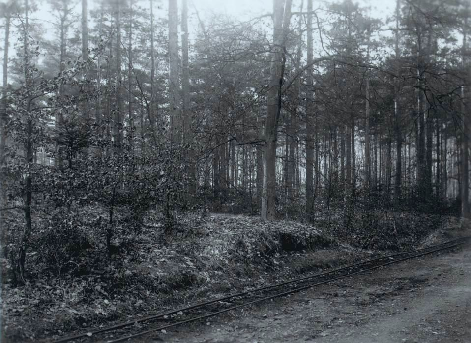 Neolothische site 'Bosvoorde-Vijvers' aan de Twee Bergenlaan in Watermaal-Bosvoorde. Gedeeltelijk zicht op de grachten en aarden wallen van het Decauville-veldspoor in het Zoniënwoud